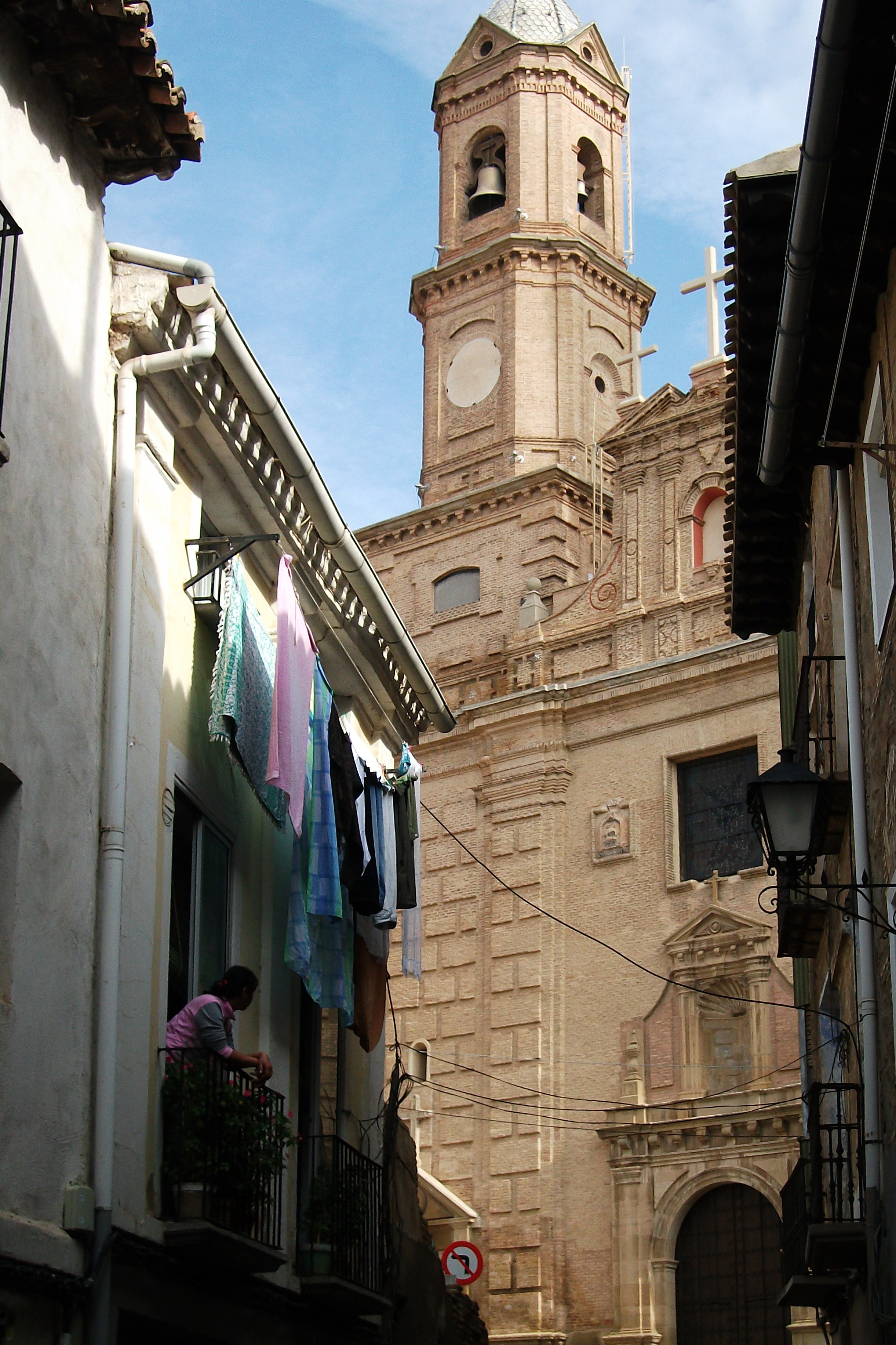 Corella. Imagen del pueblo. Noviembre de 2011